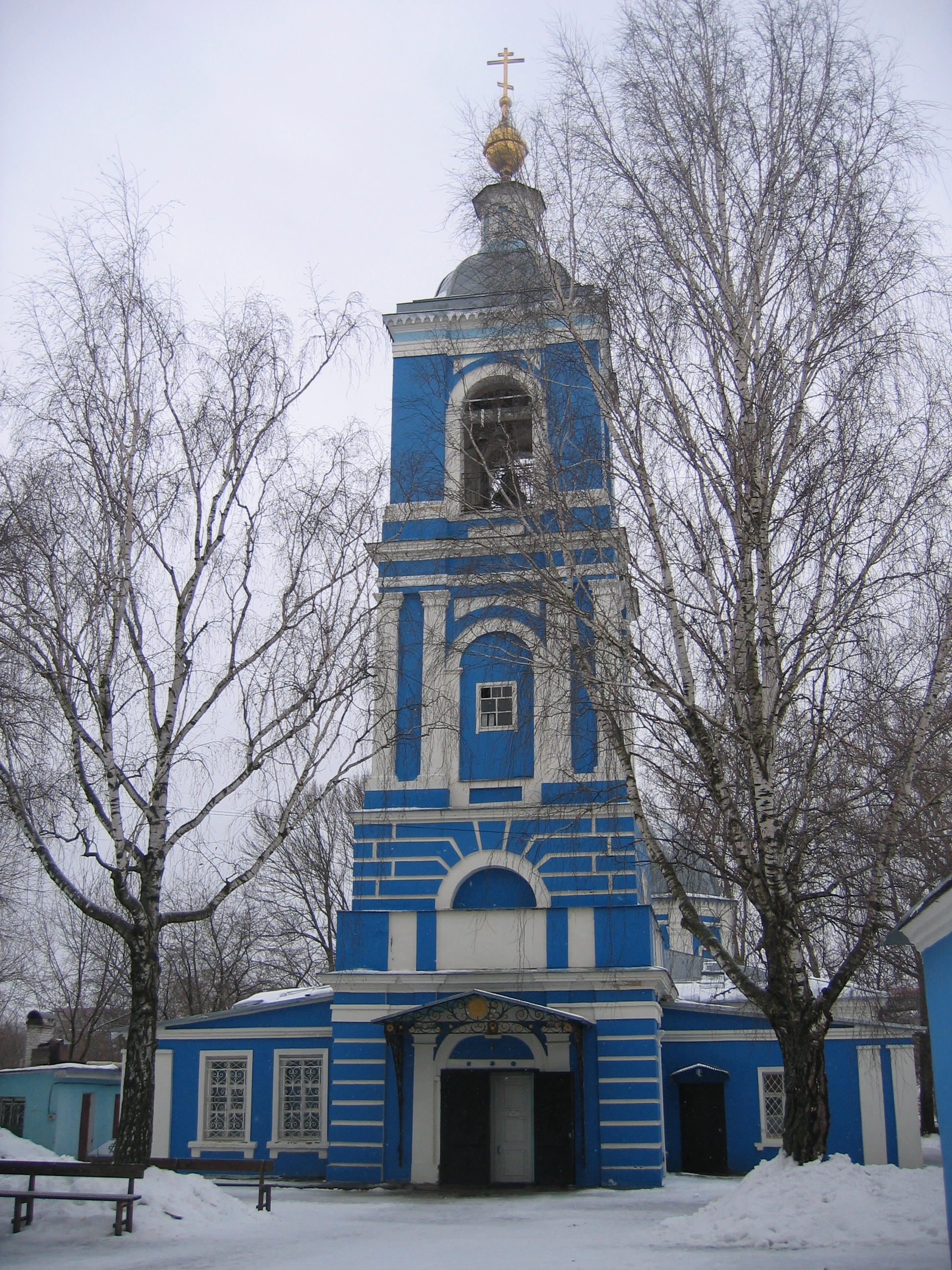 Kirche St. Johannes Chrysostomos in Woskressensk